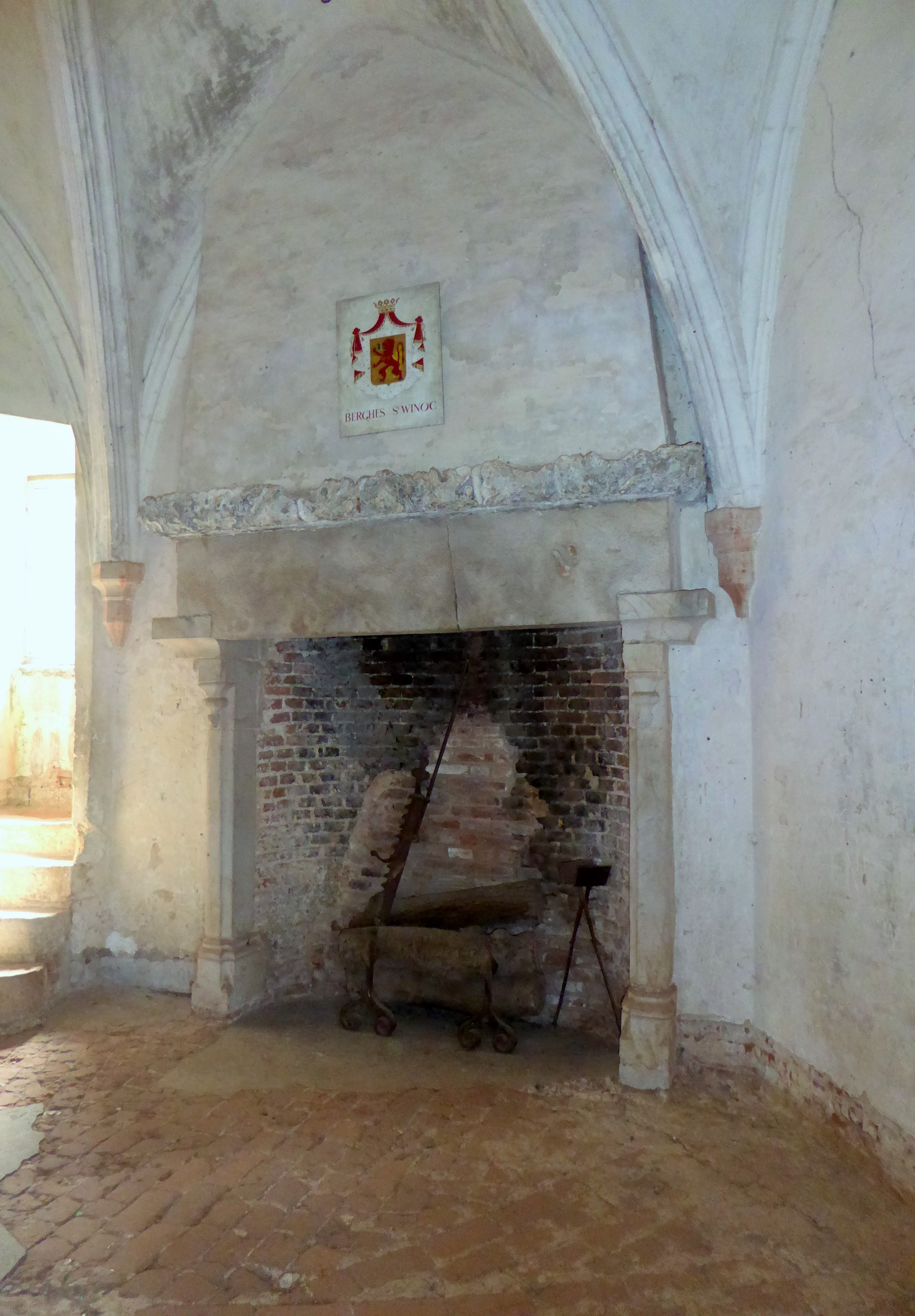 La salle du premier étage du . Château d'Olhain est connue sous le nom de salle des Gardes. Sa grande cheminée en grès, dont le linteau est agrémenté d'un cordon de feuillages, porte les armes de la Maison de Berghes-Saint-Winock (un lion)